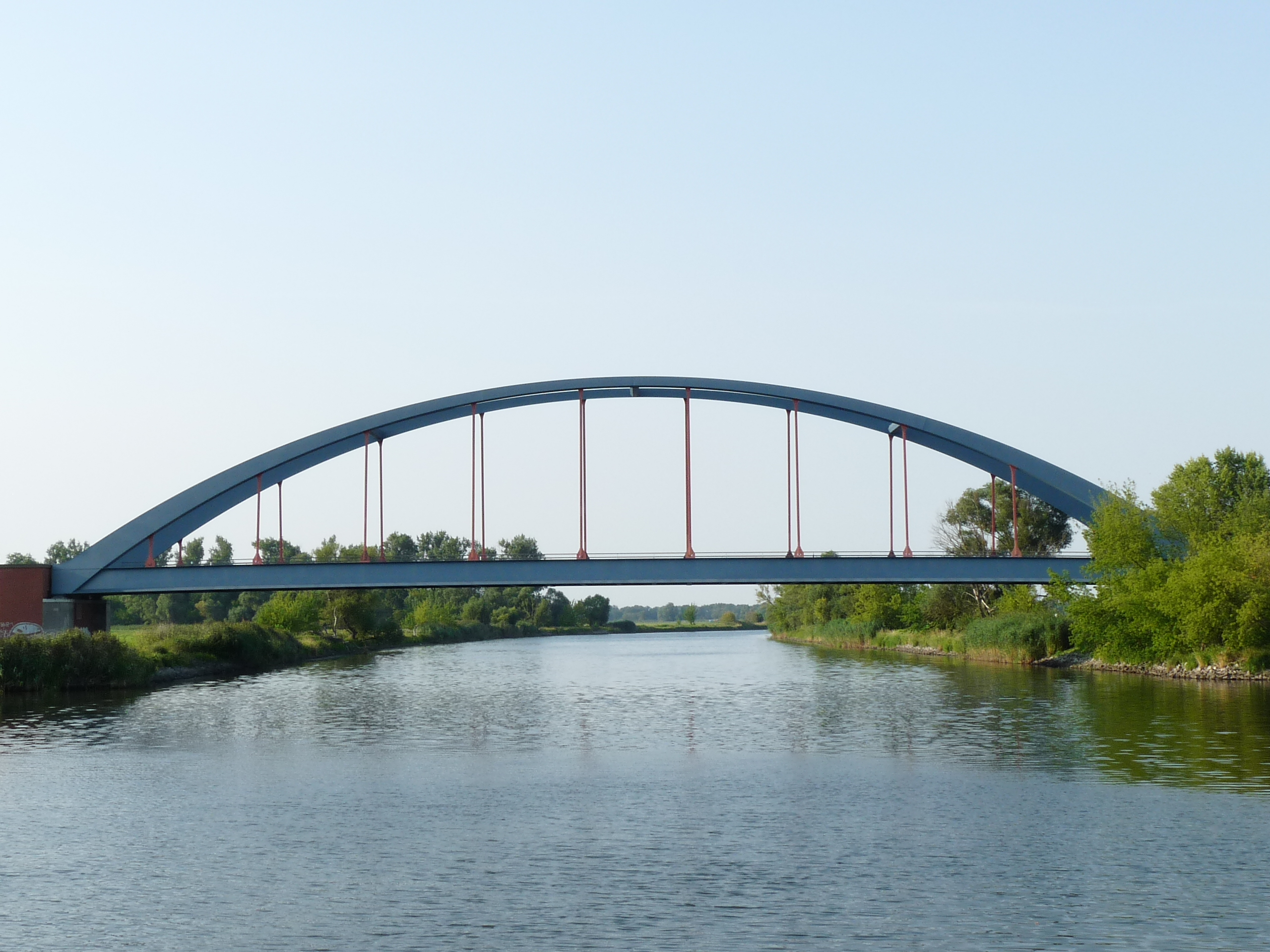 Strodehner Brücke L 17